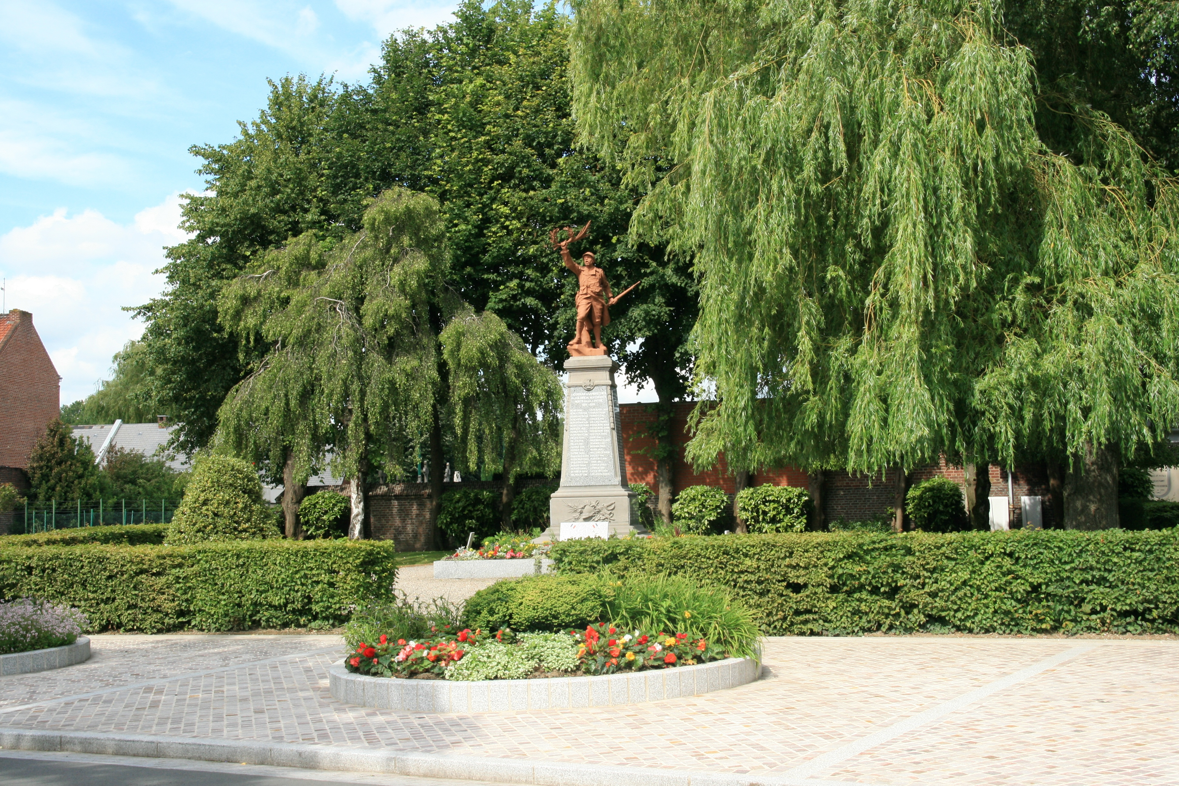 Photo prise en été 2007 par Johan BEN AZZOUZ